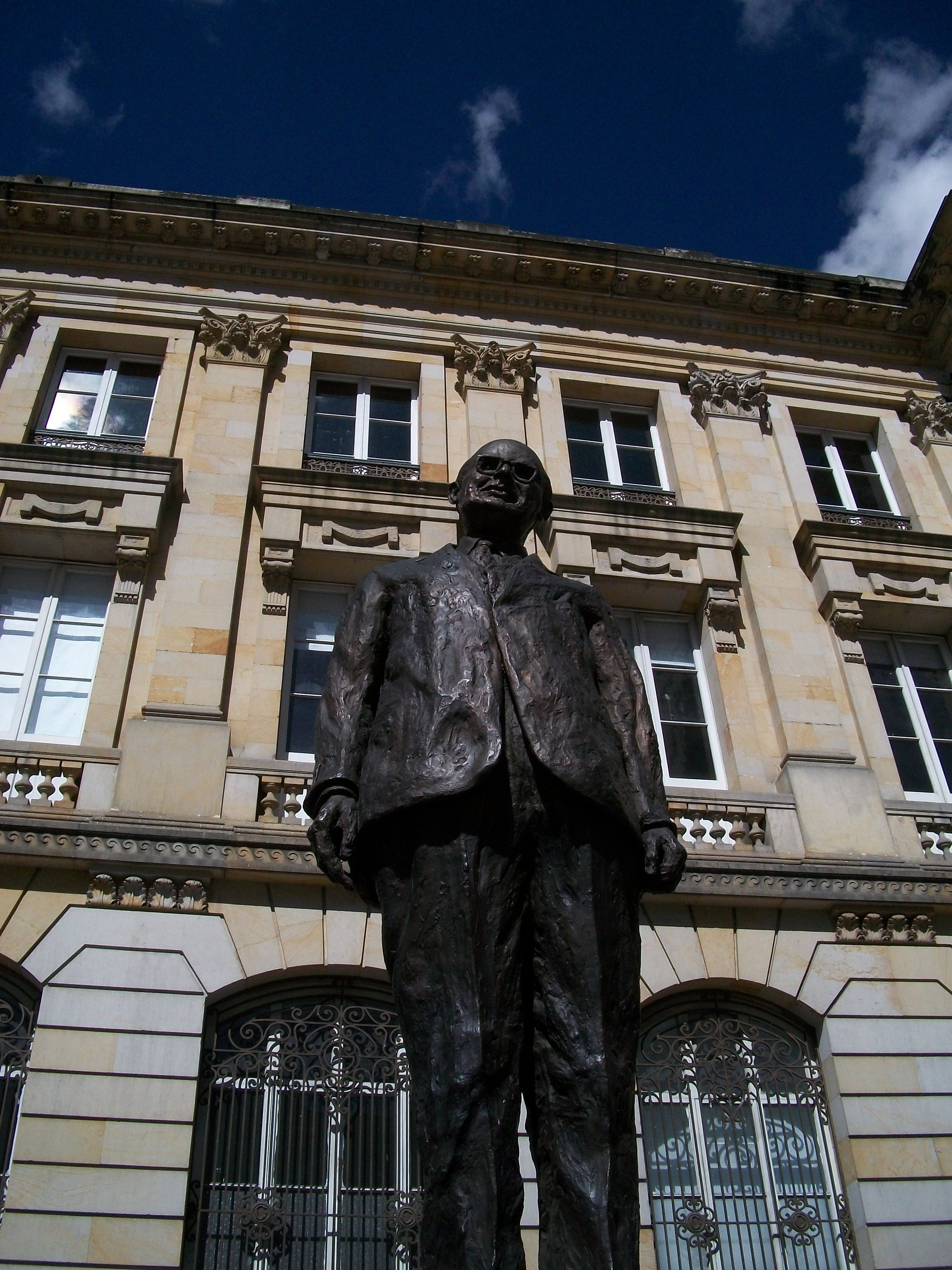 Estatua de Alfonso López Michelsen en Bogotá, Eje ambiental, antigua gobernación de Cundinamarca.